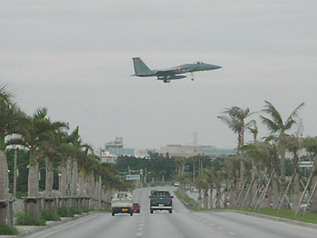 National Route 58, Kadena, Okinawa.